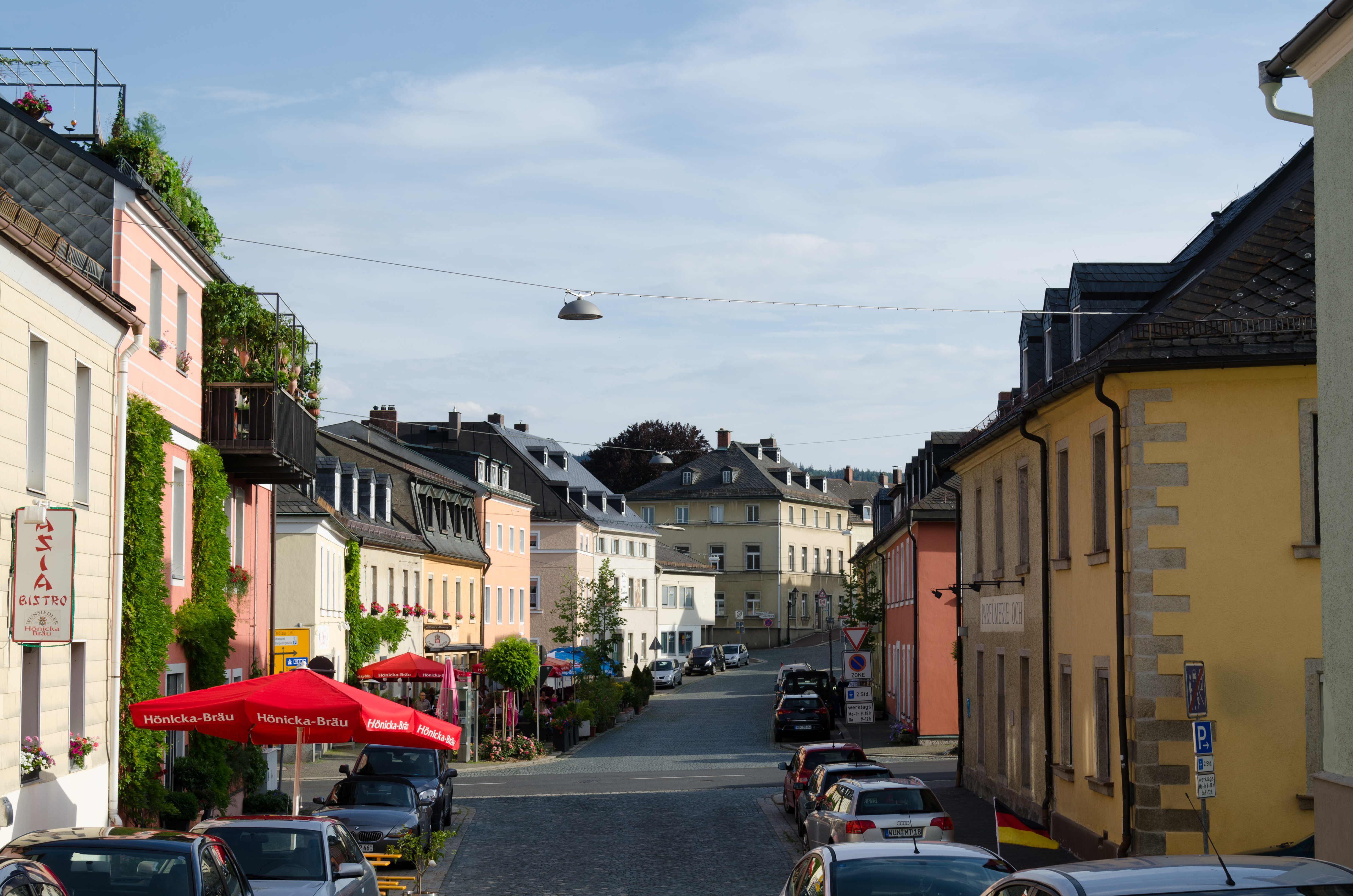 Wunsiedel, Breitestraße Nord-Süd-Blick